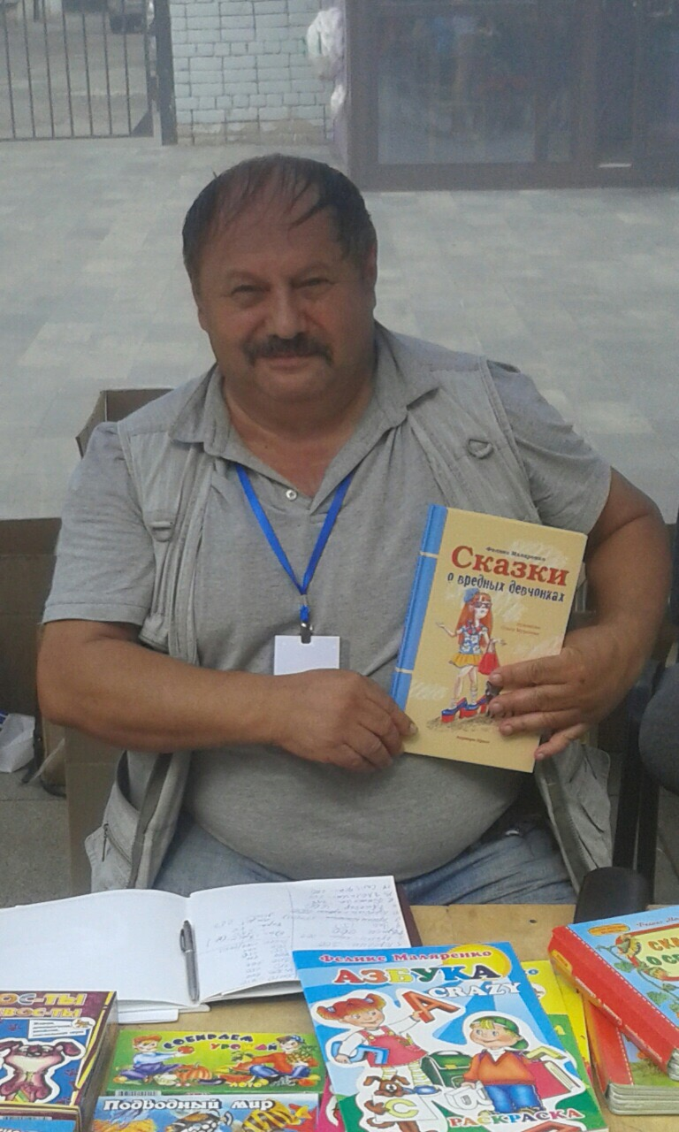 Фестиваль "Палитра ремесел"